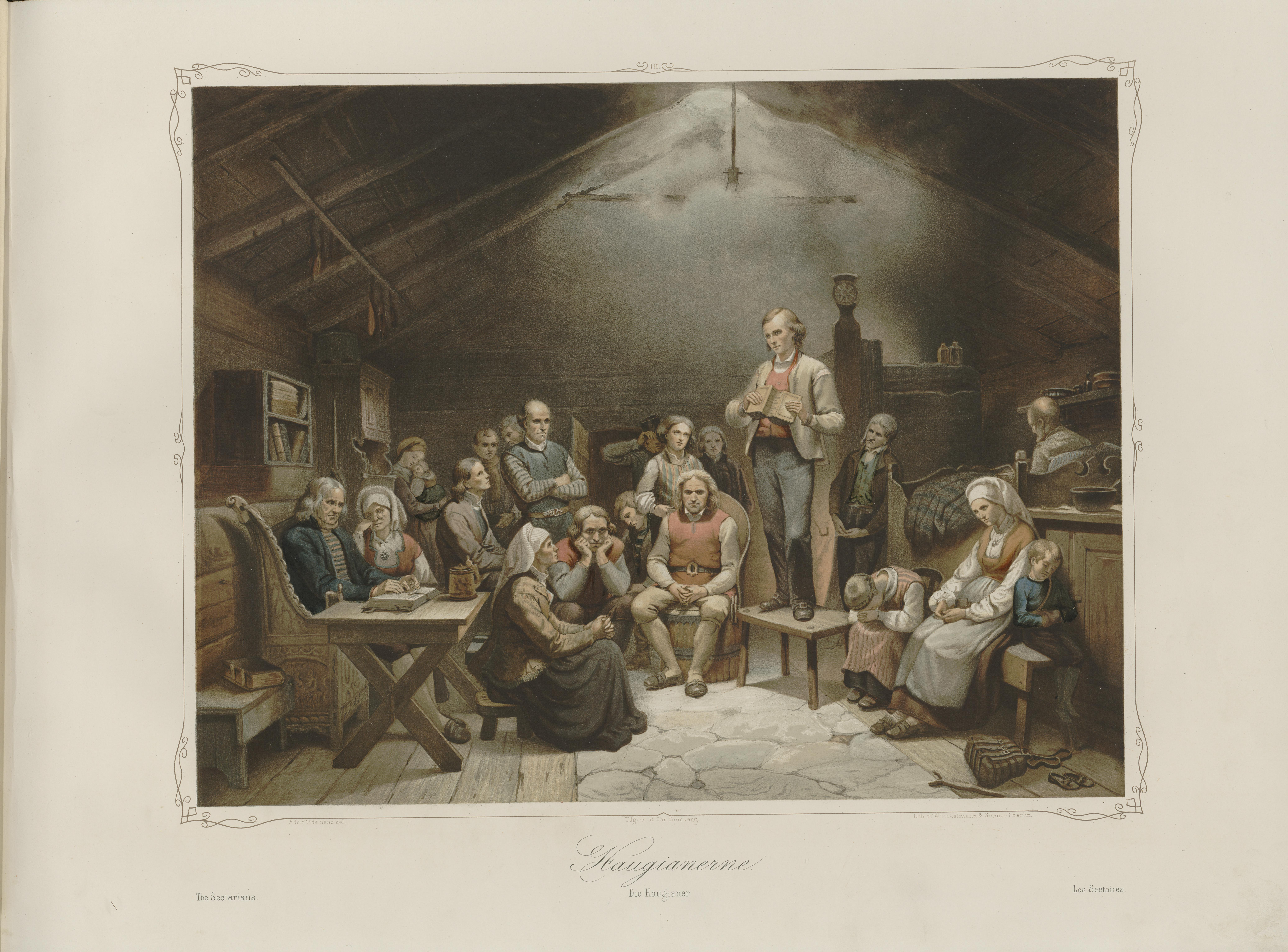 Illustrasjon hentet fra boken Norske Folkelivsbilleder av Tidemand, Adolph og utgitt av Chr. Tønsberg (Christiania, 1854)